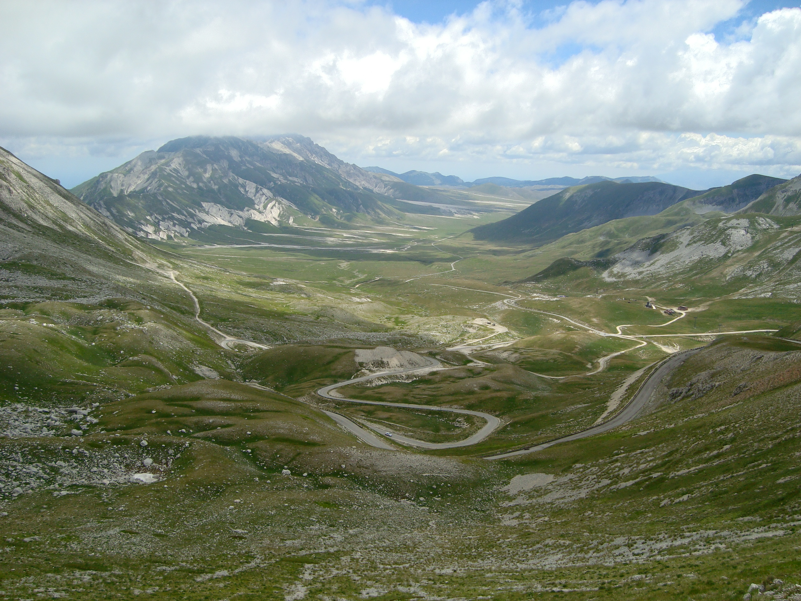 Campo Imperatore, Gran Sasso